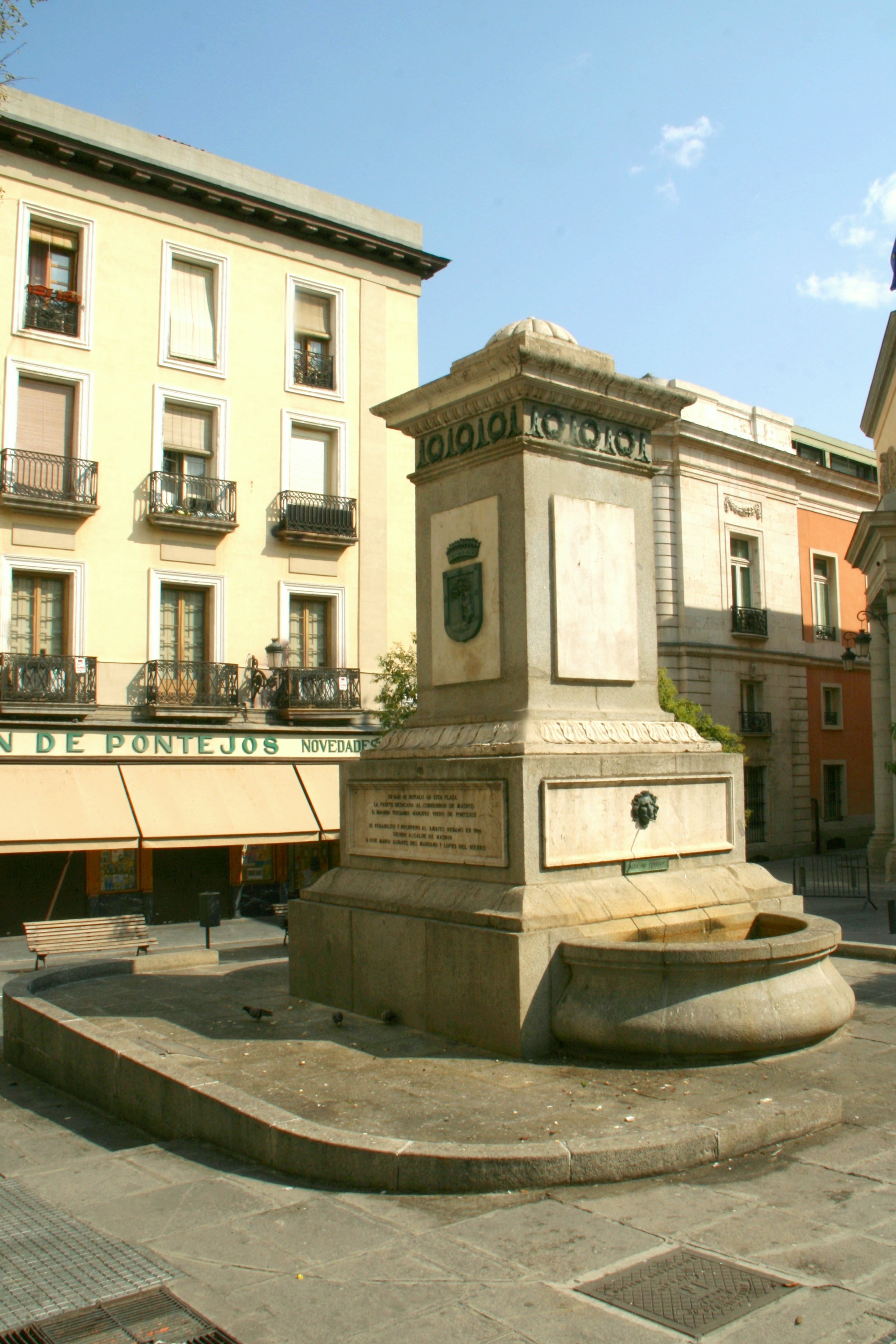 Fuente de Pontejos, 1843. Plaza de Pontejos